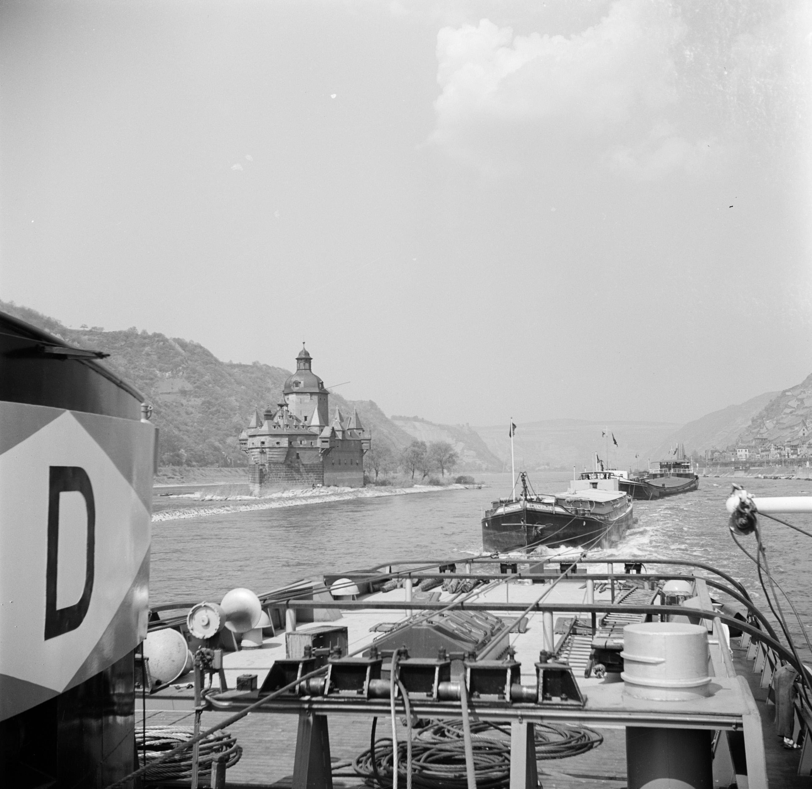 Collectie / Archief : Fotocollectie Van de Poll Reportage / Serie : Rijnvaart, reportage vanaf sleepboot Damco 9: West-Duitsland Beschrijving : Sleep met vooraan de Amoeneburg 10 bij Burg Pfalzgrafenstein Datum : 1 april 1955 Locatie : Duitsland, Kaub, West-Duitsland Trefwoorden : binnenvaartschepen, kastelen, rivieren, sleepboten Fotograaf : Poll, Willem van de, [onbekend] Auteursrechthebbende : Nationaal Archief Materiaalsoort : Negatief (6x6) Nummer archiefinventaris : bekijk toegang 2.24.14.02 Bestanddeelnummer : 254-1540